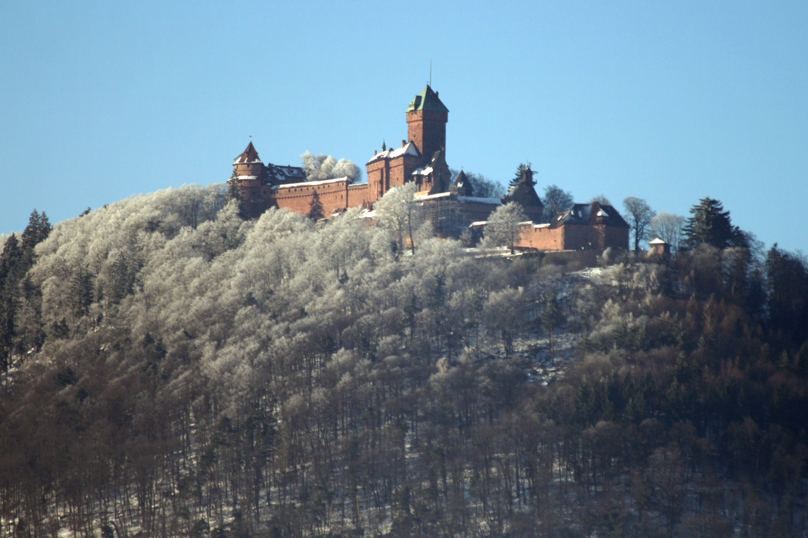 Château du Haut-Kœnigsbourg (deutsch: Hohkönigsburg), Elsass (Département Bas-Rhin)/Frankreich